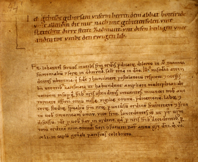 Nonnengelöbnis oder Konversenprofess für zukünftige Laienschwestern. Der Schrifttyp zeigt den Übergang von der karolingischen zur gotischen Minuskel, Entstehungsort ist vermutlich Admont. Admonter Codex 567. 141 Pergamentblätter im Quartformat, gebunden zwischen 1139 und 1241. Ausschnitt aus Blatt 44 verso.